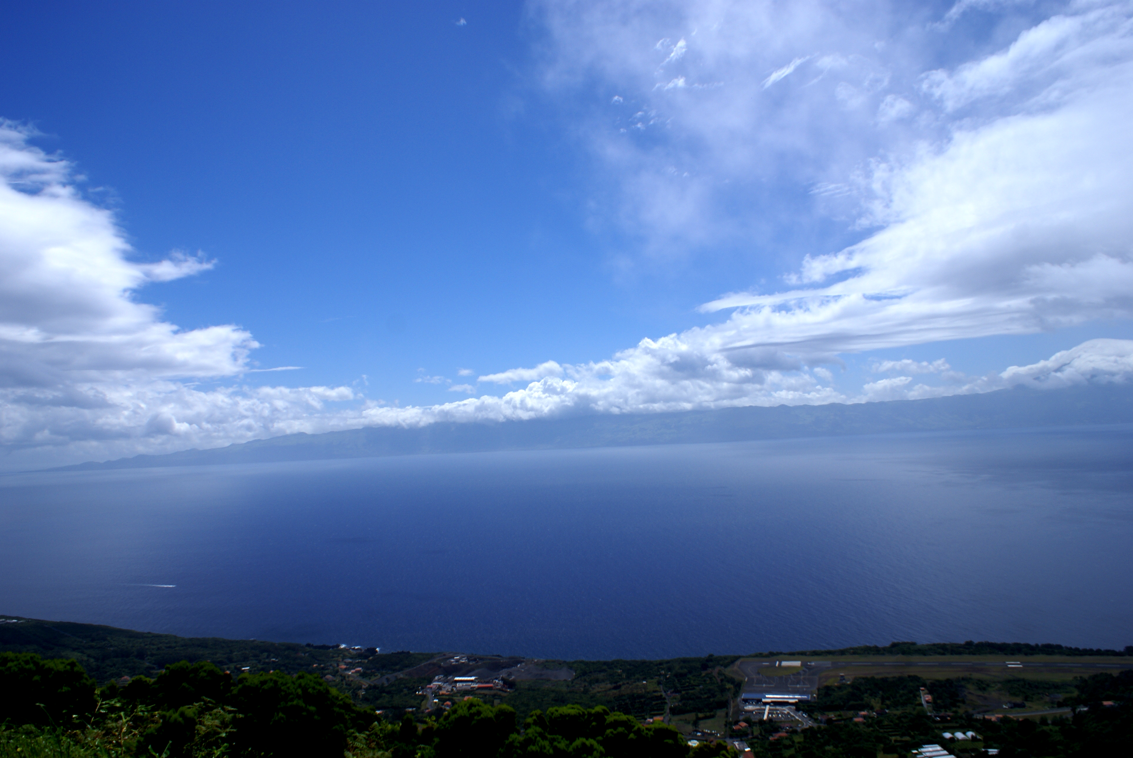 Parque do Terreiro da Macela, vista de mar, a ilha do Pico ao fundo, Velas, ilha de São Jorge, Açores